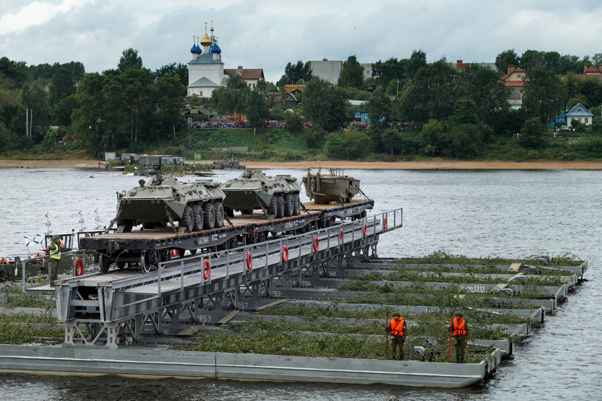 Учение 38-й отдельной железнодорожной бригады по возведению наплавного железнодорожного моста НЖМ-56 длиной 1 км через Волгу.